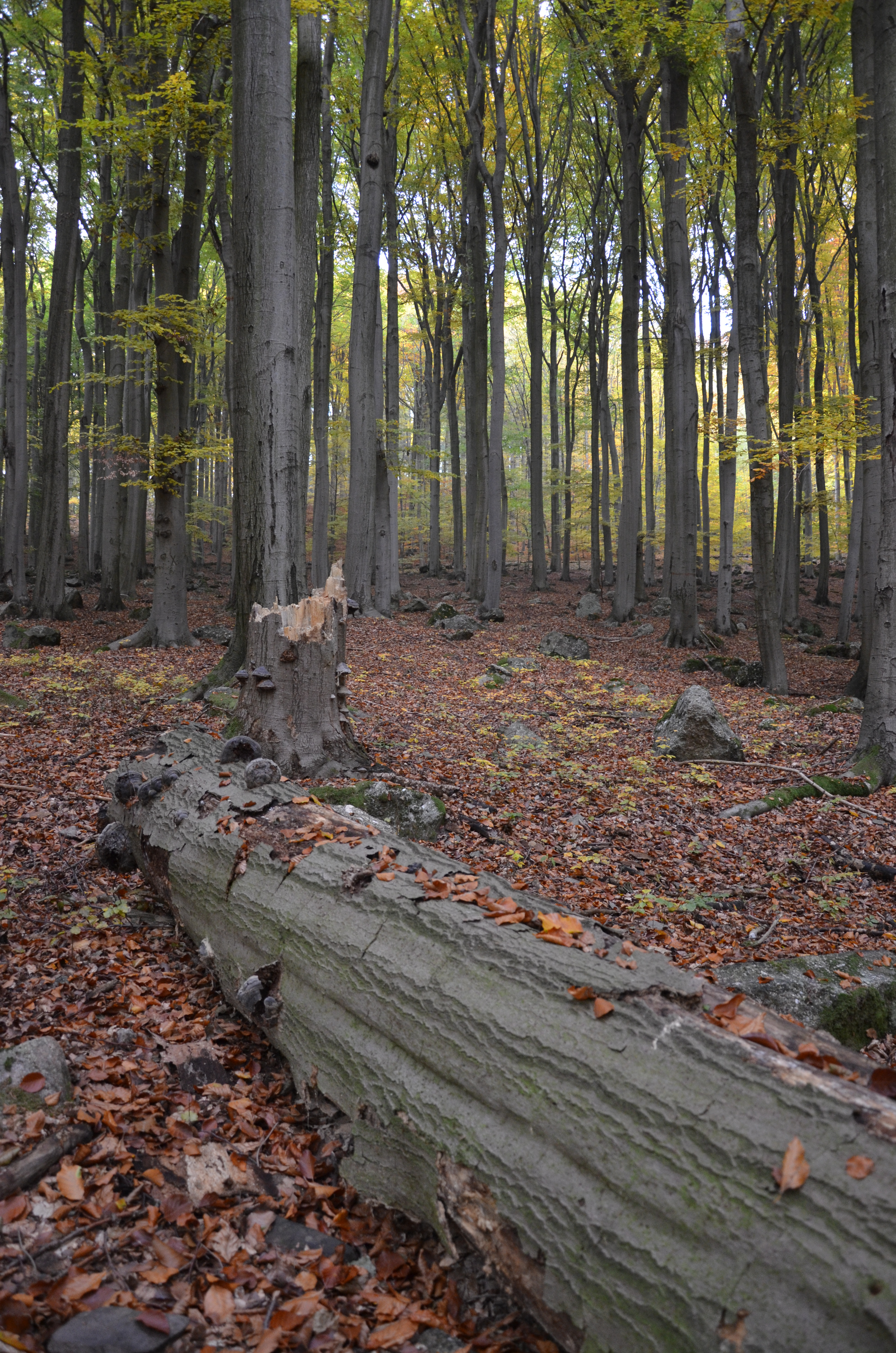 Padlý strom v přírodní rezervaci Kamenná hůra (okres Jičín)